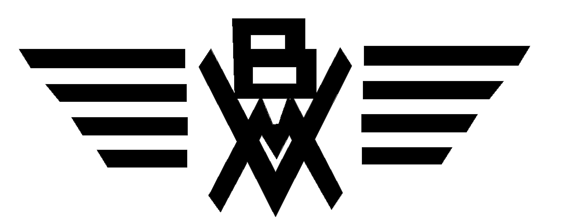 Rekonstruksi Bataviasche Verkeers Maatschappij logo